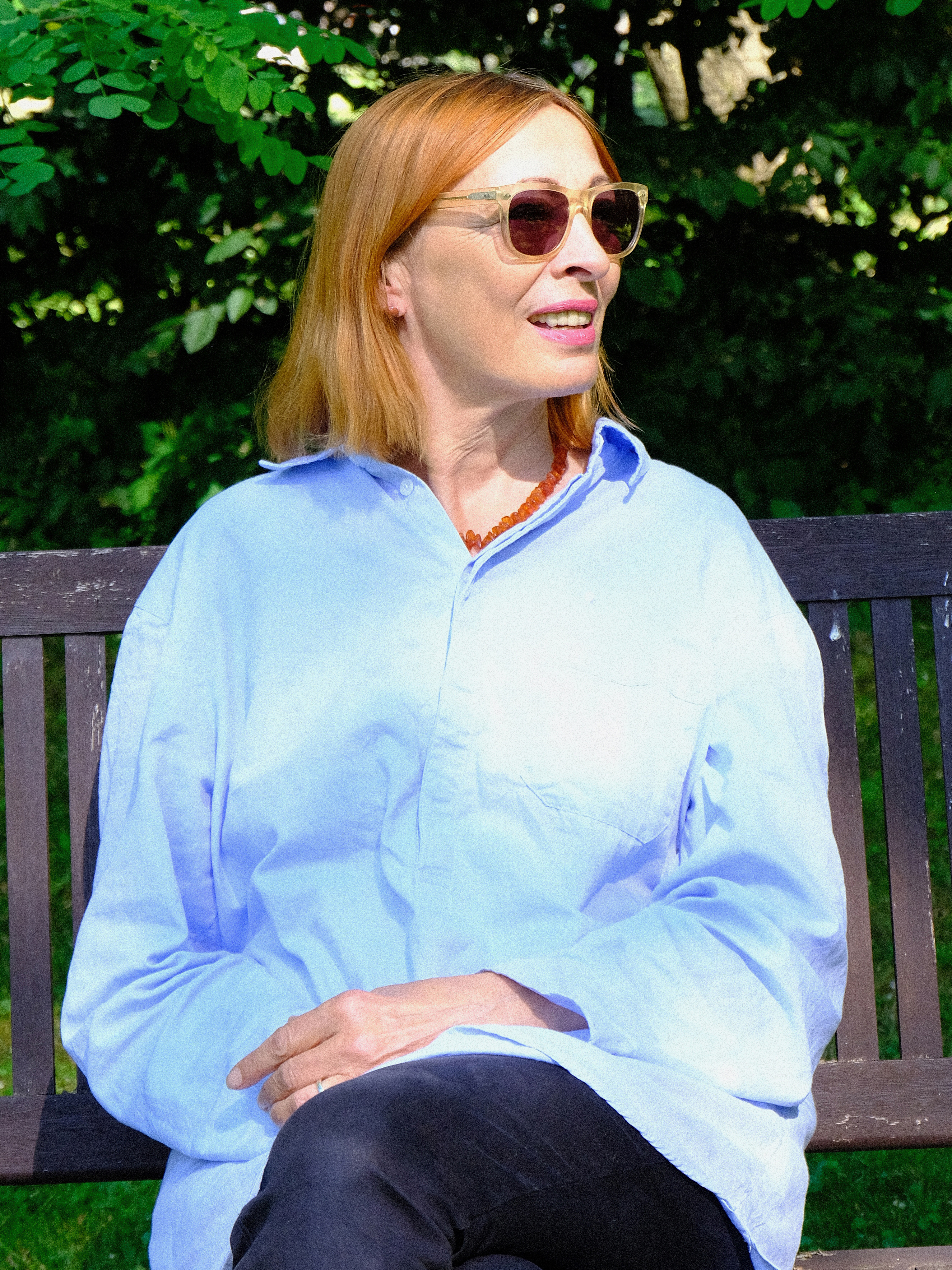 Gudrun Gut, aufgenommen im Park von Sternhagen Gut (2020)